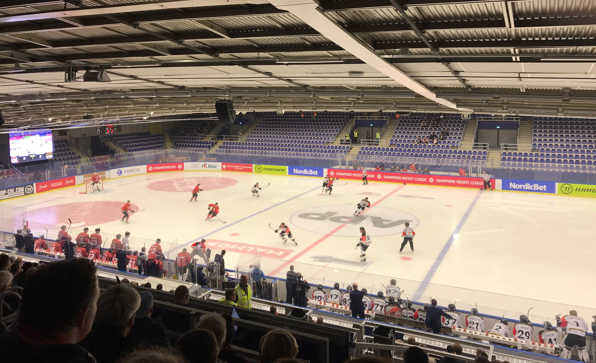 Malmö Redhawks-Stavanger Oilers, Champions Hockey League 2017/2018, Malmö isstadion